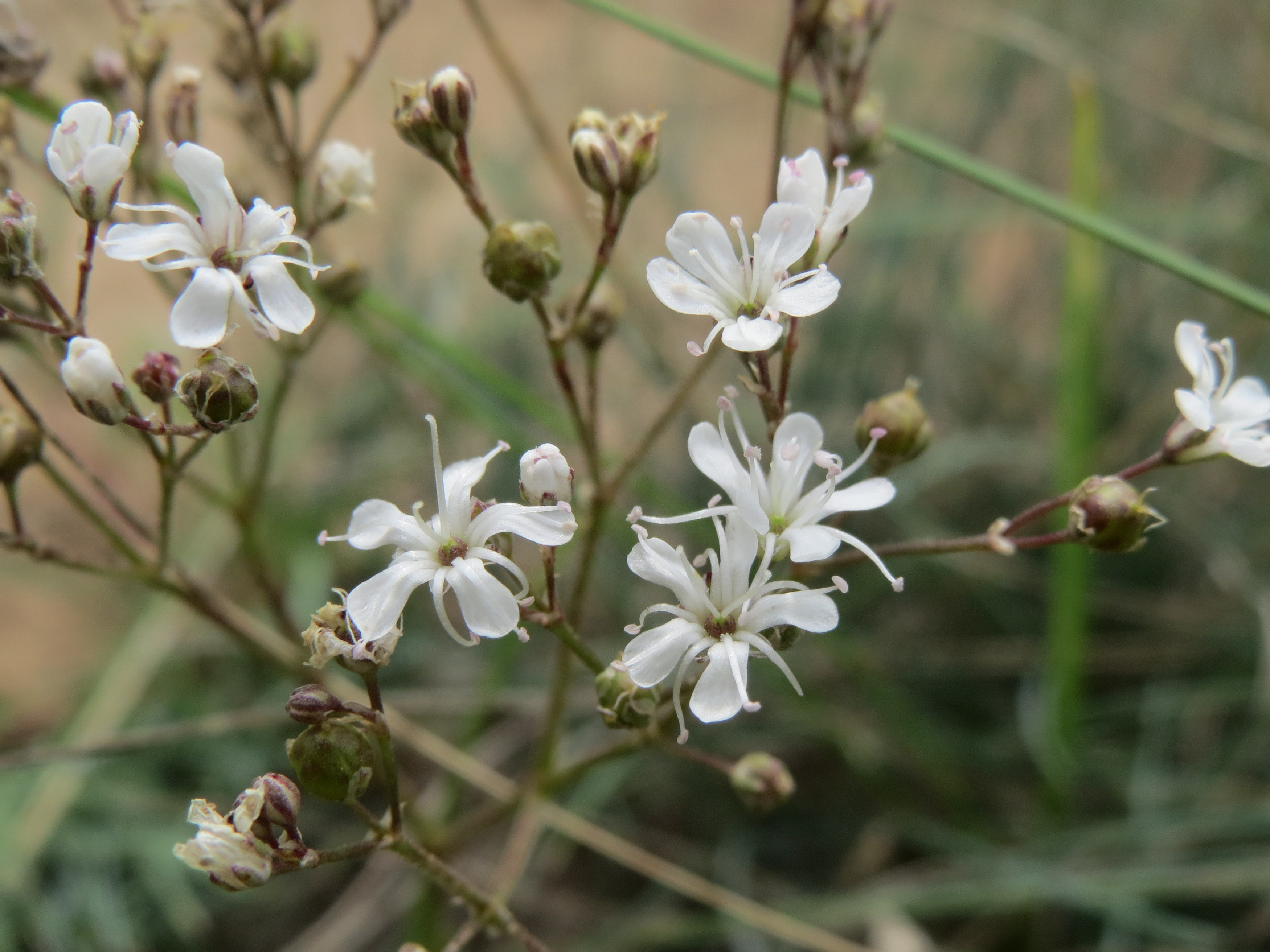 Büscheliges Gipskraut (Gypsophila fastigiata) im Mainzer Sand